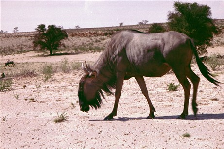 Gnu